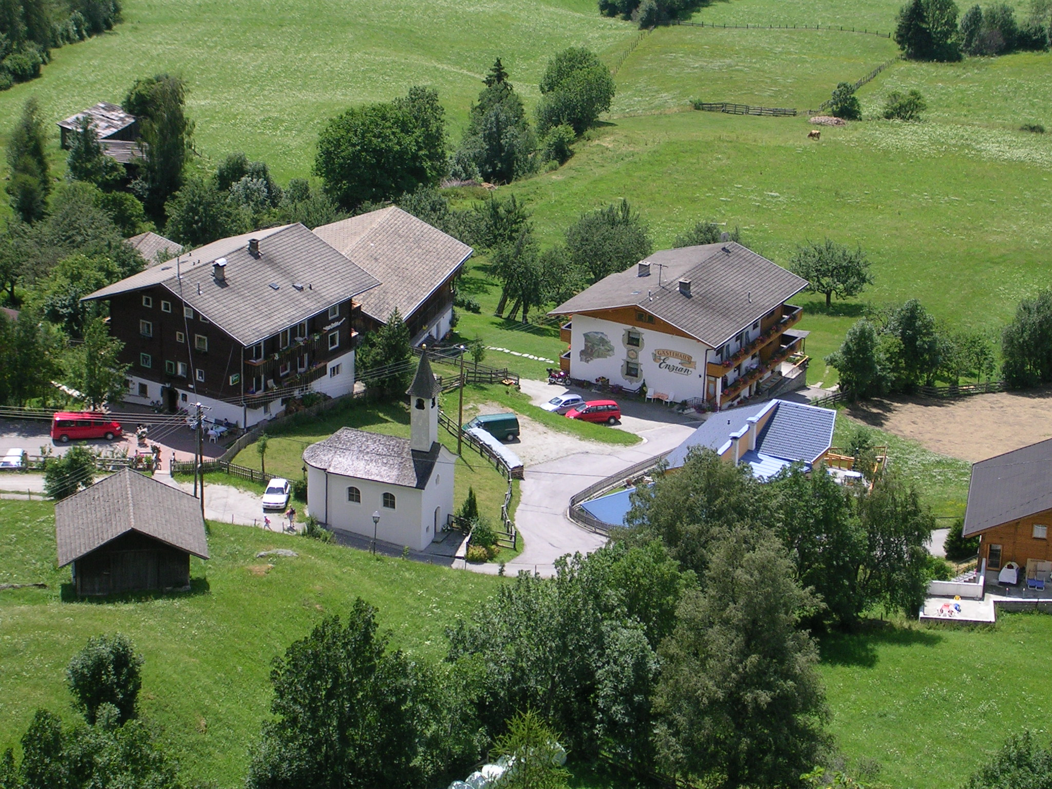 Mellitz, Fraktion der Gemeinde Virgen (Osttirol) gesehen von der Burgruine Rabenstein